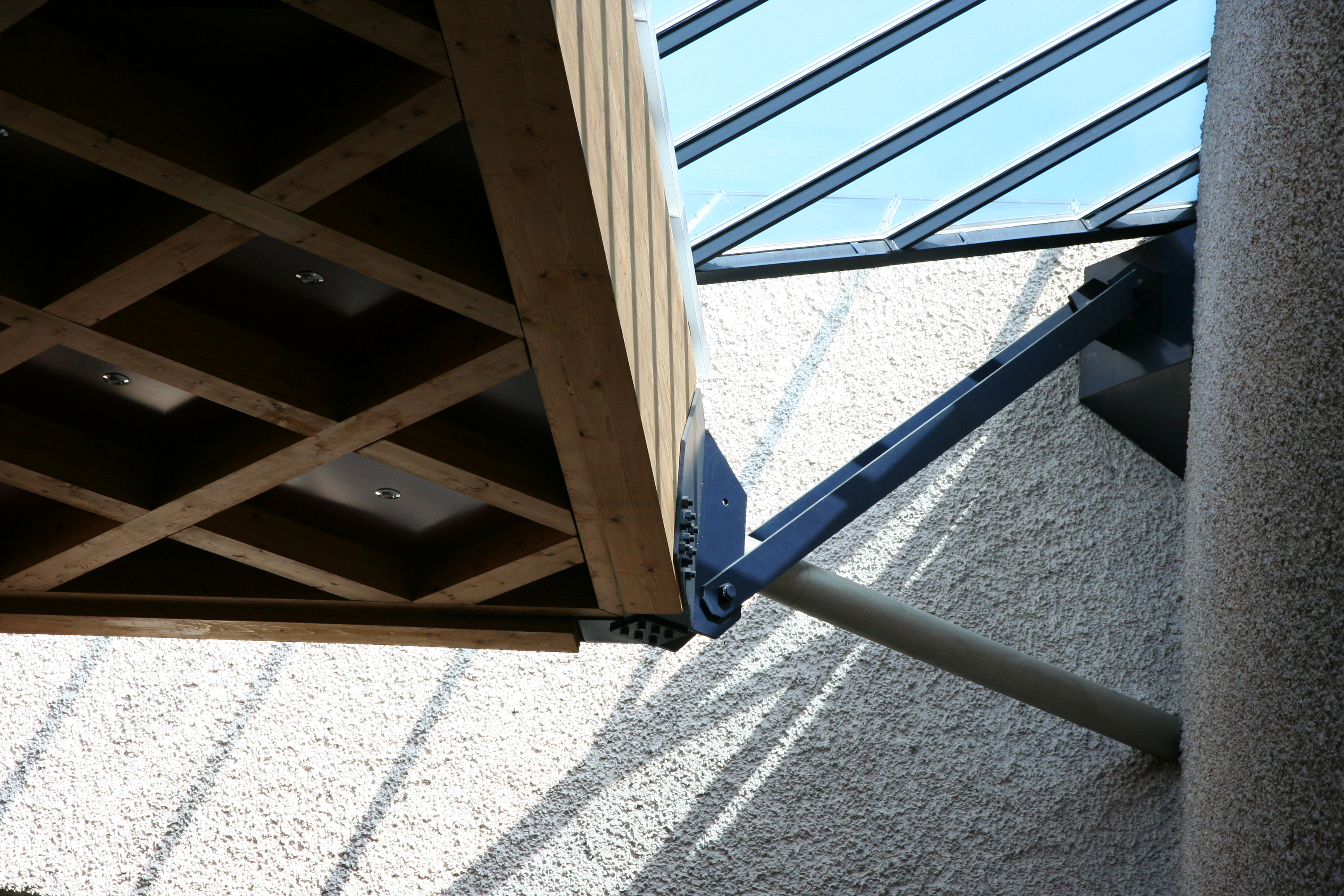 Römisch-katholische Kirche St. Agnes Erlenbach ZH